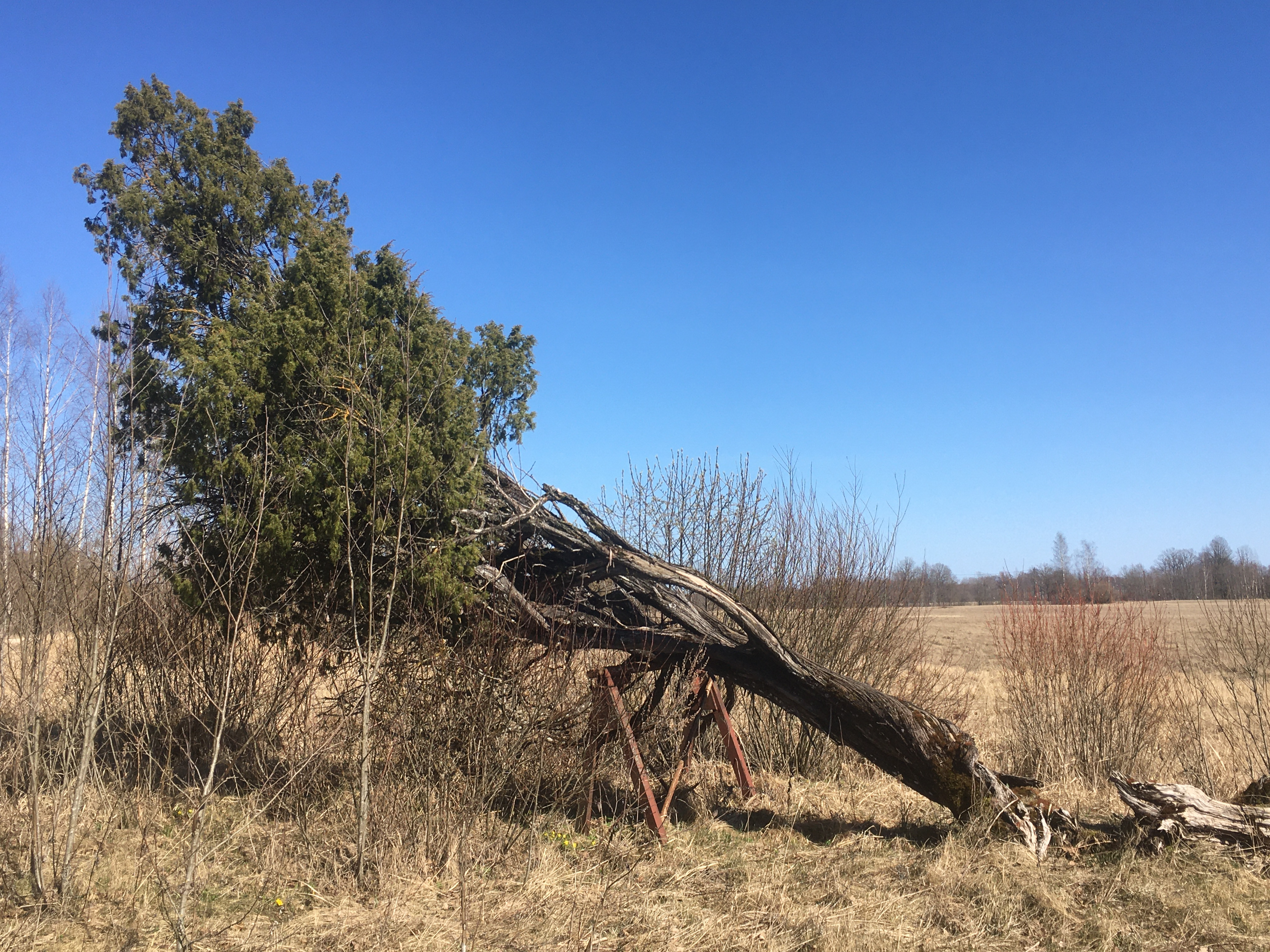 Auziņu paeglis 2020